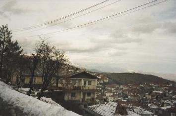 Kruševo